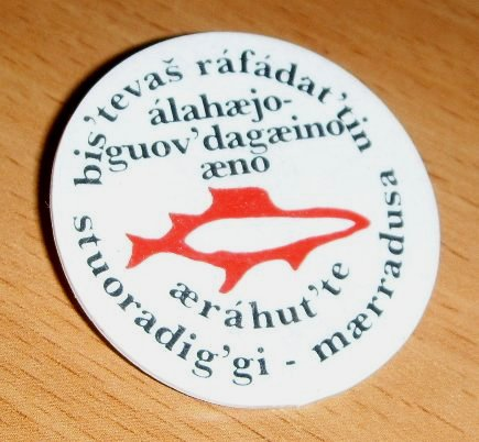 Supporter-button of Folkeaksjonen mot utbygging av Alta-Kautokeinovassdraget in Norway, sami languaged. Photographed by me, Jan S. Krogh.